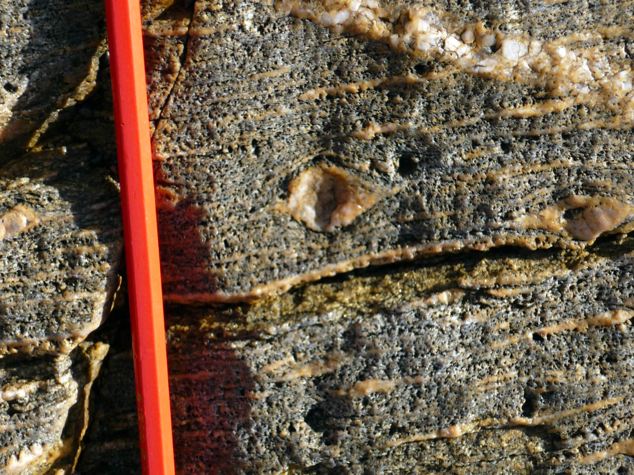 La Chaume, Sables d'Olonne, France: phénocristaux de feldspath dans un gneiss œillé. Ces cristaux sont déformés par la pression lors de la mise en place de la roche, d'où leur forme en amande et leur appellation d'yeux. Les lits de biotite contournent et moulent les yeux de feldspath. Ces derniers sont donc antérieurs à la foliation, et antérieurs au métamorphisme.